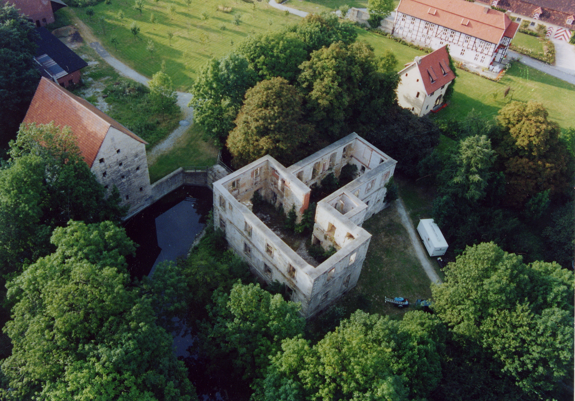 Luftaufnahme der Schlossruine in Störmede